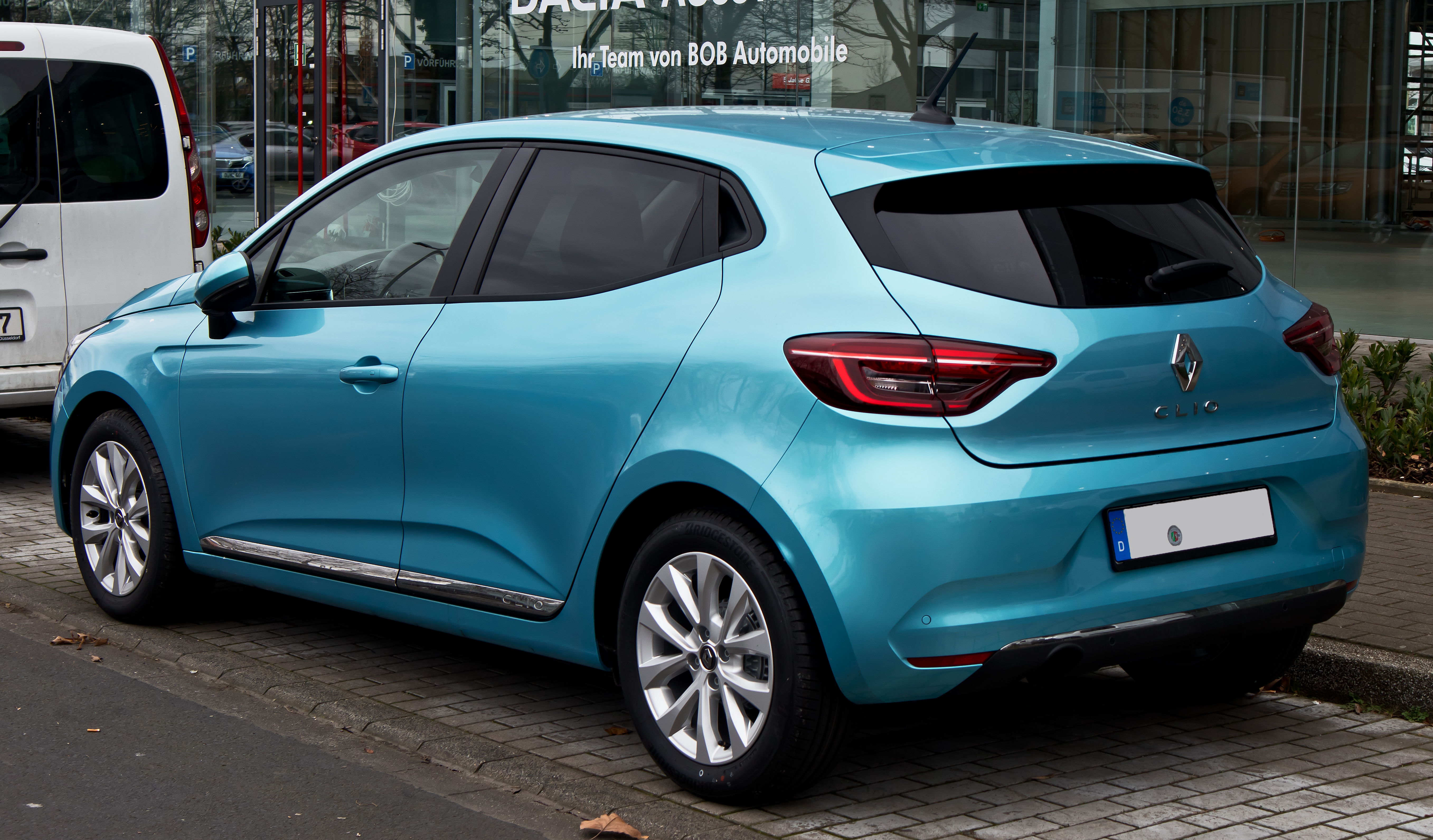 Renault Clio TCe 100 Experience (V)